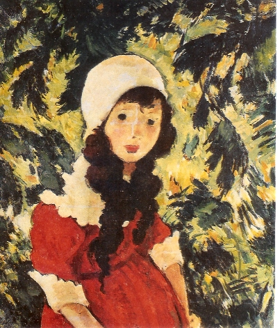 Fetiţa pădurarului (1924), ulei pe carton, 0.600 x 0.500. Colecţia Doctor I. N. Dona, Bucureşti